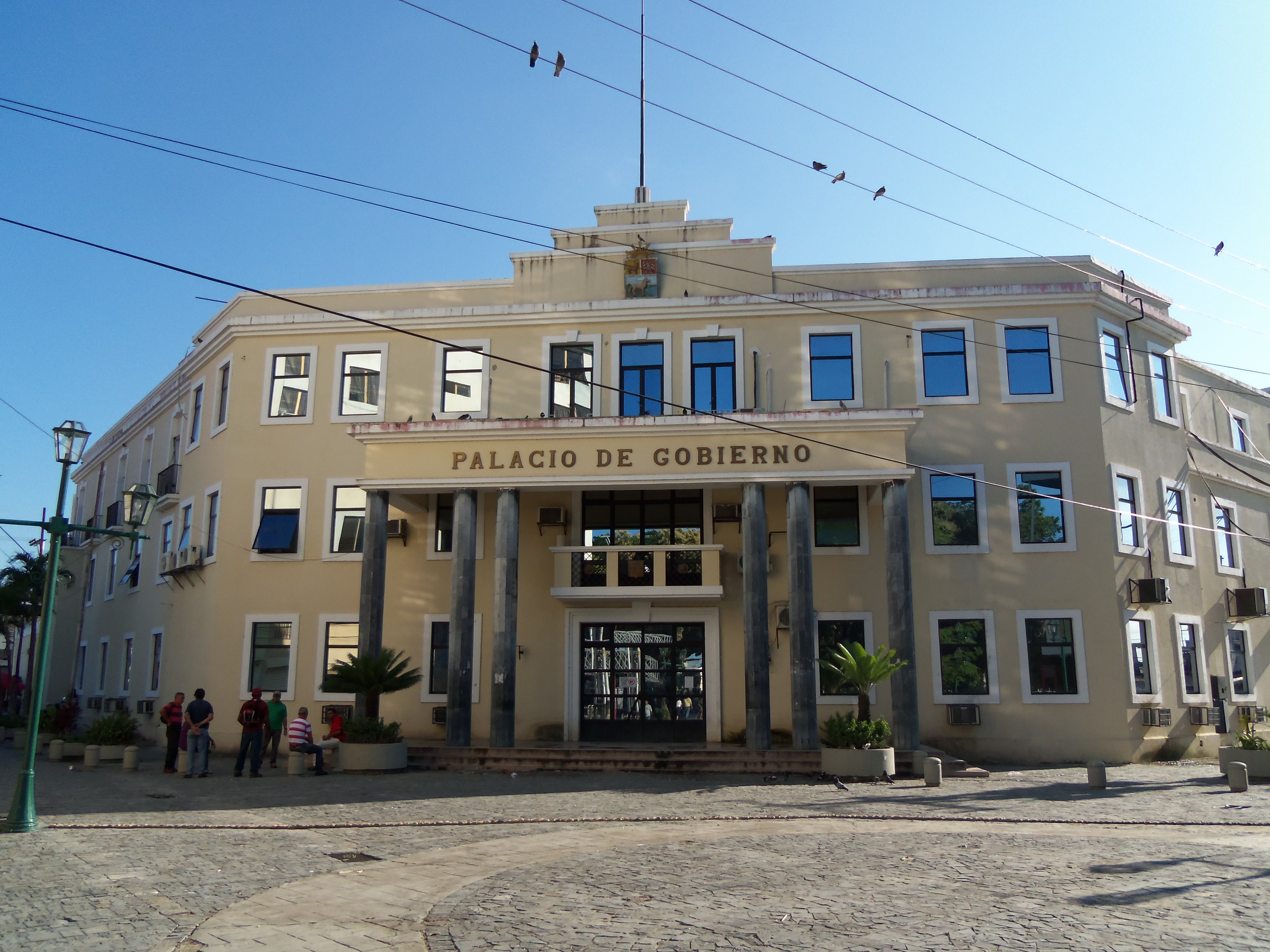 Palacio de Gobierno